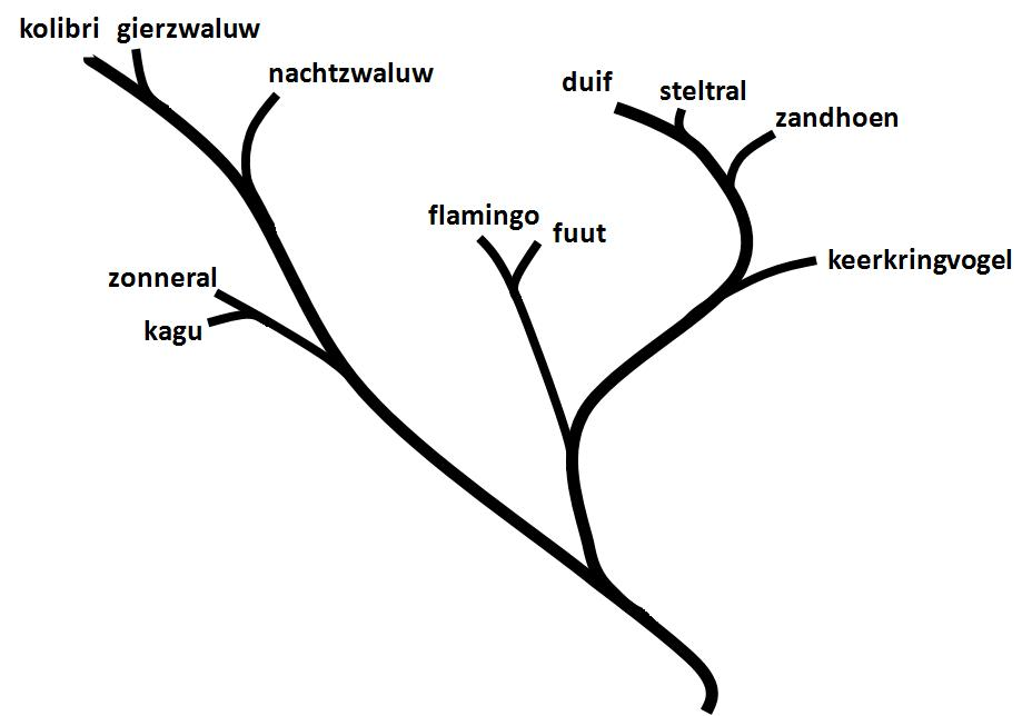 Stamboom van de duif/kolibri tak van de vogels volgens de DNA resultaten van Hackett et al